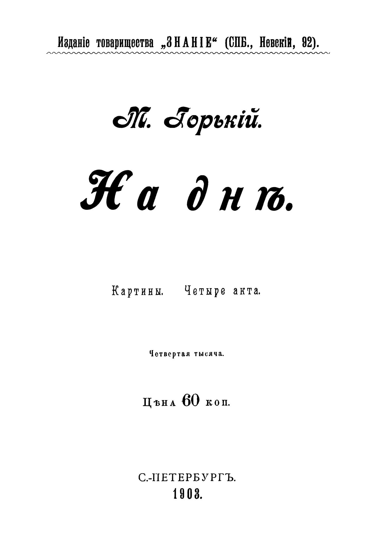 Изданіе товарищества „ЗНАНІЕ* (СПБ., Невскій, 92). М . Горькій. На днѣ. Картины. Четыре акта. Четвертая тысяча. ЦѢНА 60 КОП . С.-ПЕТЕРБУРГЪ. 1903. Типографія ясурн. «Искусство и Худож. Промыпм.» U. П. Собко. Почтамтская, 13. Посвящаю Константину Петровичу Пятницкому. М. Горькій.